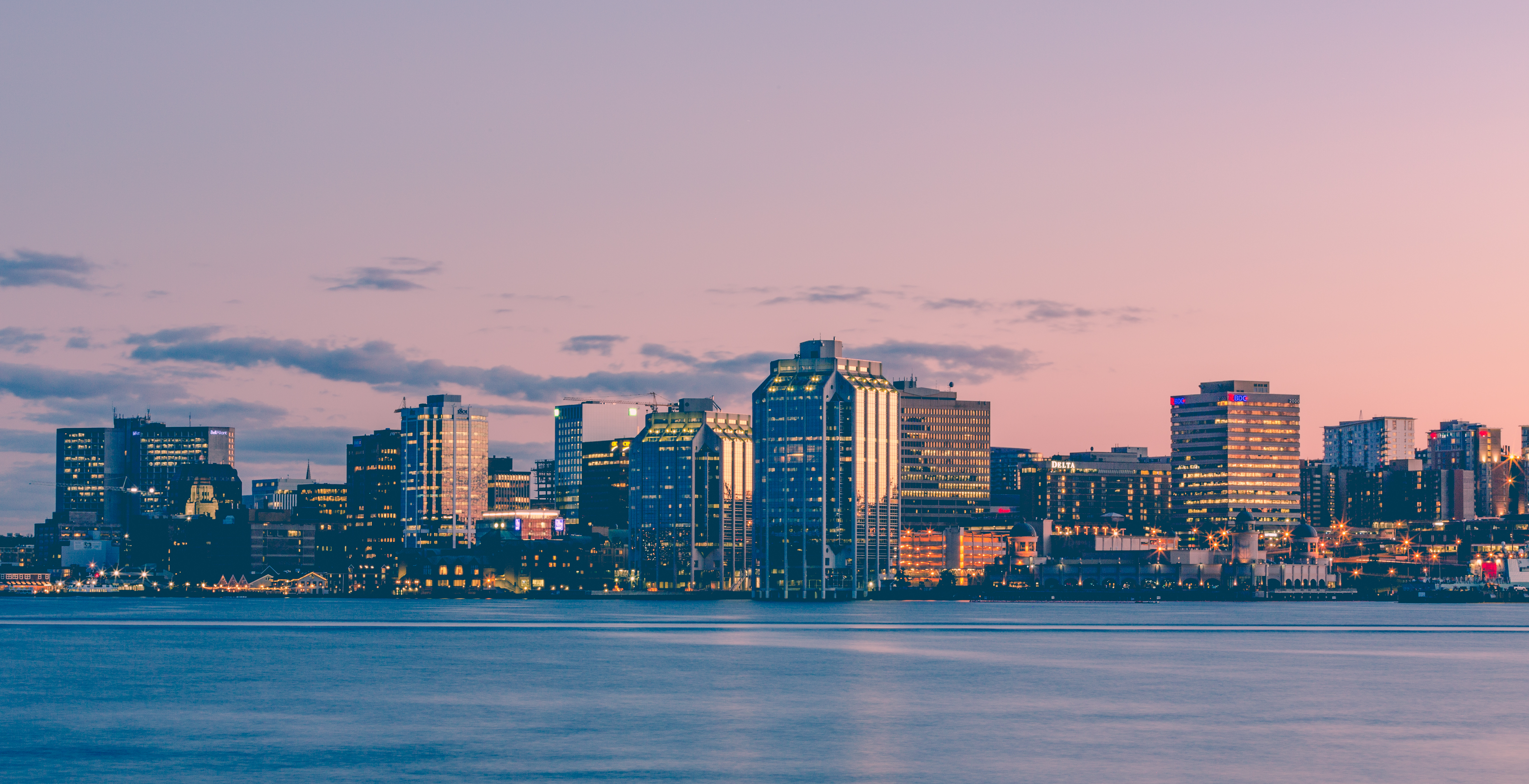 Halifax, Nova Scotia, Canada